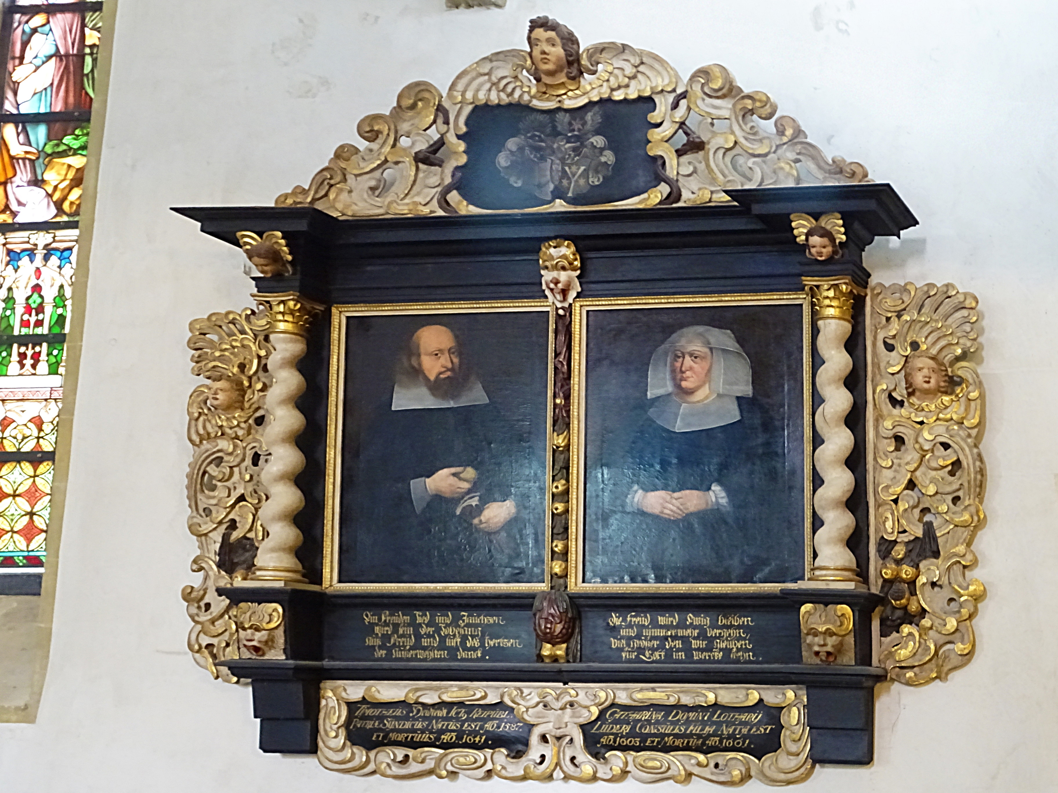 Epitaph des Bürgermeisters Timotheus Heidfeld und seiner Frau Catharina von 1661 in der Pfarrkirche St. Nikolai (Quedlinburg)